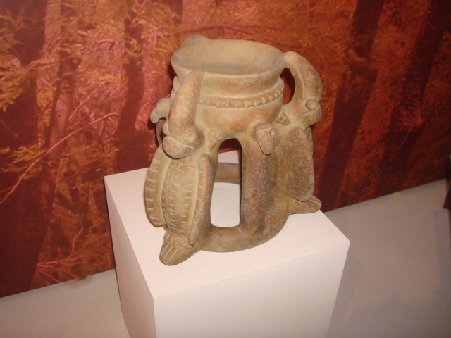 Vasija de cerámica precolombina. Parque Nacional Volcán Poás. El pueblo de los botos, localizado en las llanuras del norte de Costa Rica, perteneció al Área Intermedia, por lo que recibió influencia mesoamericana que se ve reflejada en la elaboración de cerámica y objetos de jade.